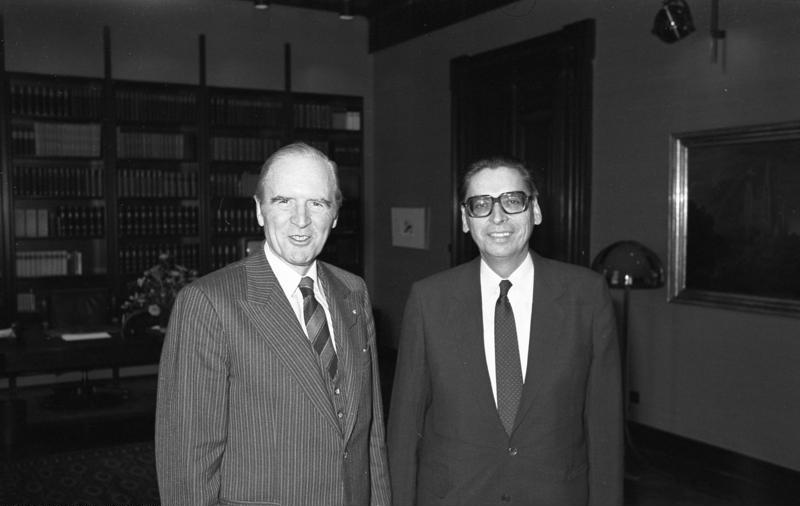 Bundespräsident Karl Carsens empfängt Botschafter Rolf Enders im Bundespräsidialamt